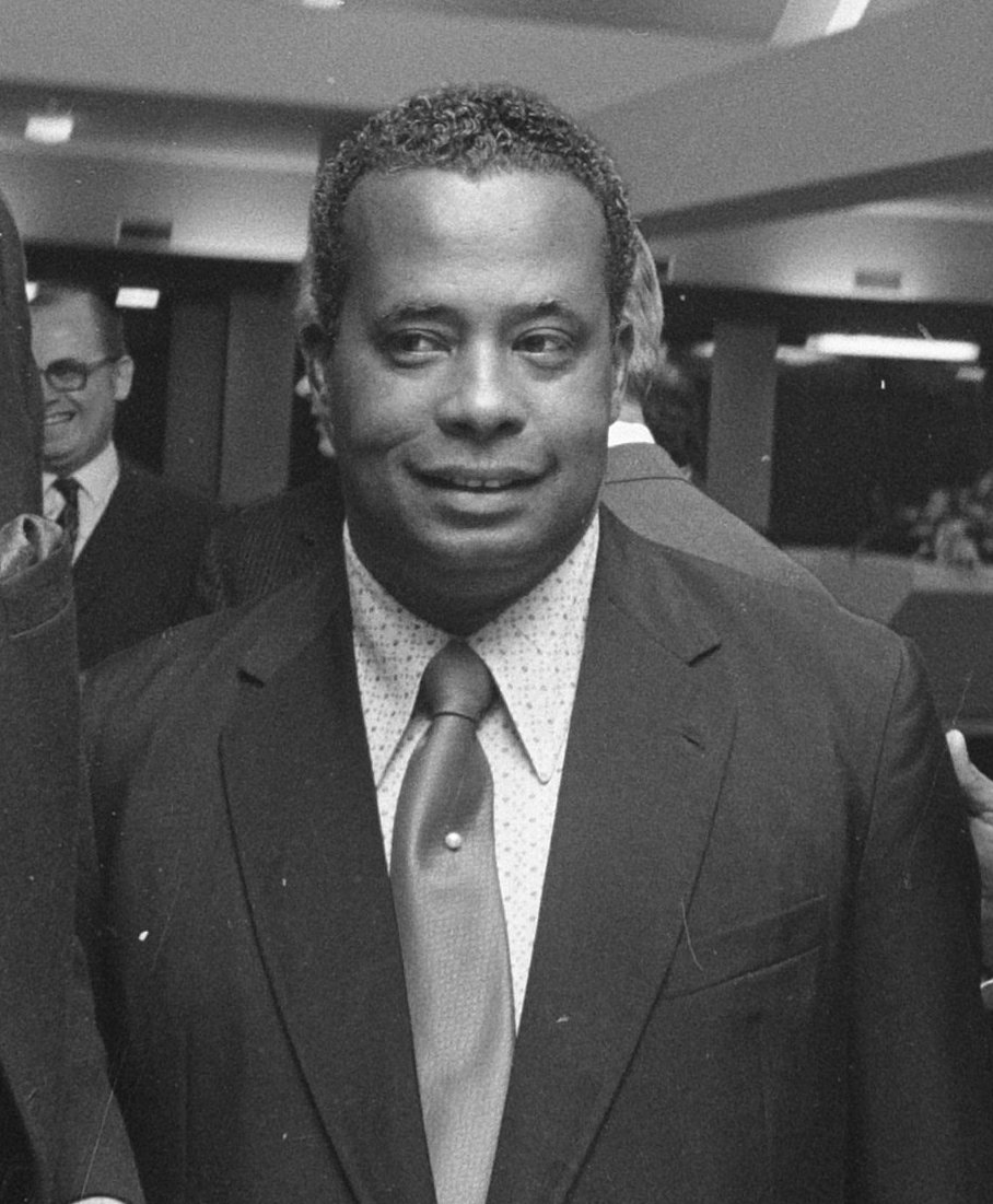 Collectie / Archief : Fotocollectie Anefo Reportage / Serie : [ onbekend ] Beschrijving : Installatie Koninkrijkscommissie in Congresgebouw in Den Haag ; v.l.n.r. Biesheuvel, Sedney (Suriname), Lachmo (Statenvoorzitter Suriname) Datum : 27 maart 1972 Locatie : Den Haag, Zuid-Holland Persoonsnaam : Lachmon, J. Instellingsnaam : Congresgebouw Fotograaf : Mieremet, Rob / Anefo Auteursrechthebbende : Nationaal Archief Materiaalsoort : Negatief (zwart/wit) Nummer archiefinventaris : bekijk toegang 2.24.01.05 Bestanddeelnummer : 925-4873